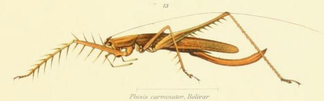 Orthoptera Afrophisis carminator (Bolívar, 1906)